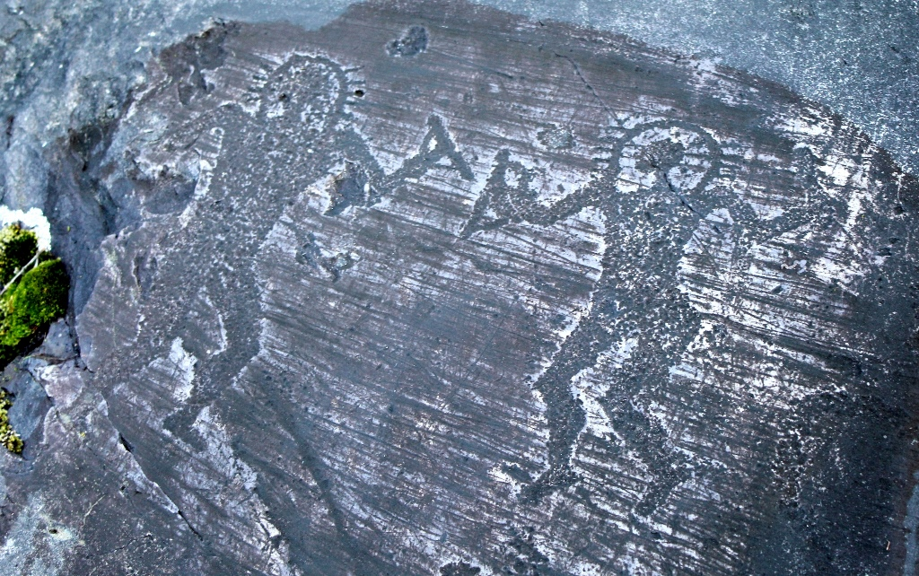 Antropomorfi detti astronauti - R 1 - Area di Zurla - Nadro